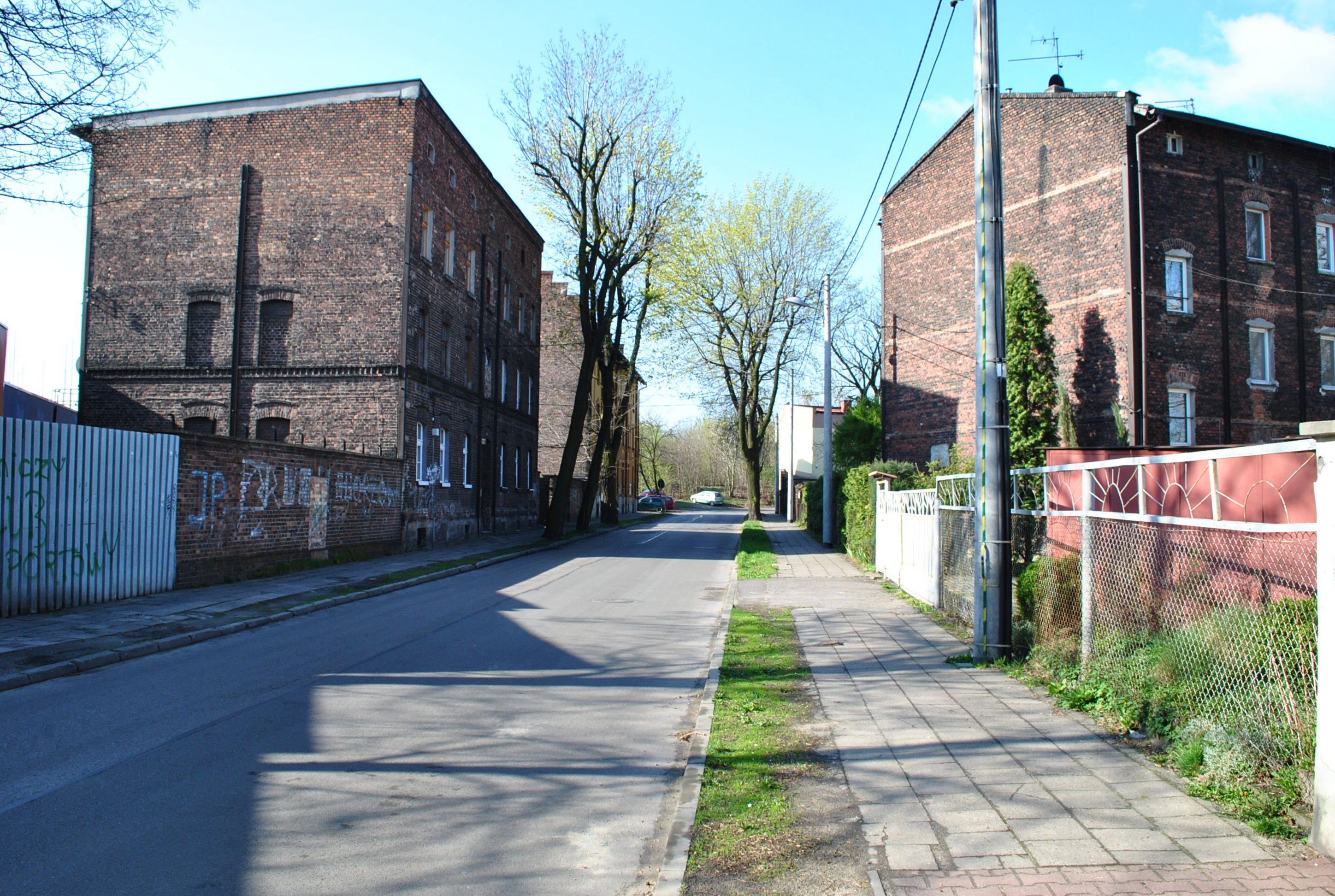 Katowice - Załęże. Ulica ks. Pawła Pośpiecha (widok w kierunku południowym)